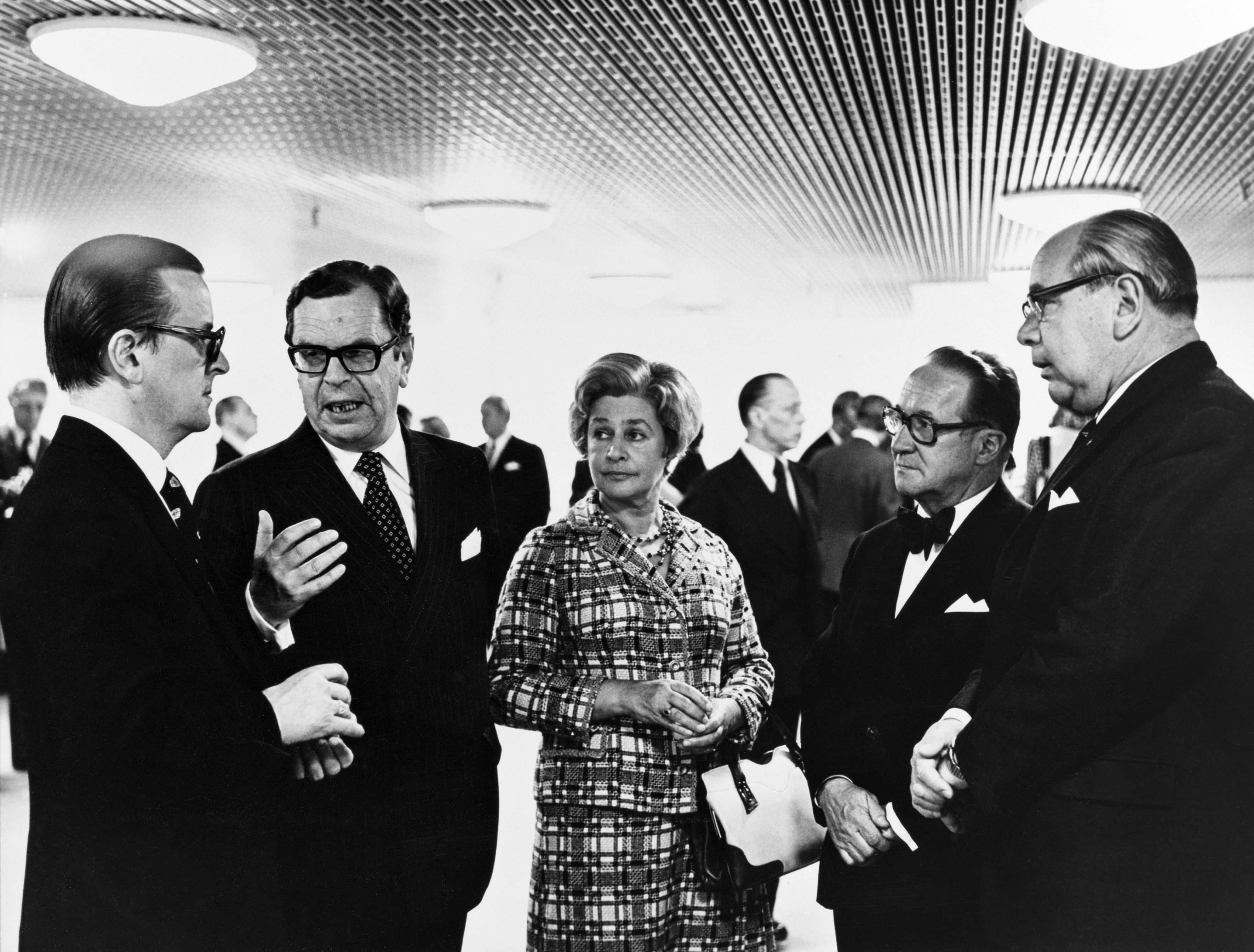 Finlandia-talon kongressisiiven vihkiäistilaisuus. Kutsuvieraita: vas. kaupunginkanslian osastopäällikkö Harri Sormanen, Finlandia-talon yli-intendentti Bengt Broms, rouva Broms, kiinteistöviraston virastopäällikkö Pentti Lehto sekä opetus- ja sivistystoimen apulaiskaupunginjohtaja ja konsertti- ja kongressitalojaoksen puheenjohtaja A .K. Loimaranta.